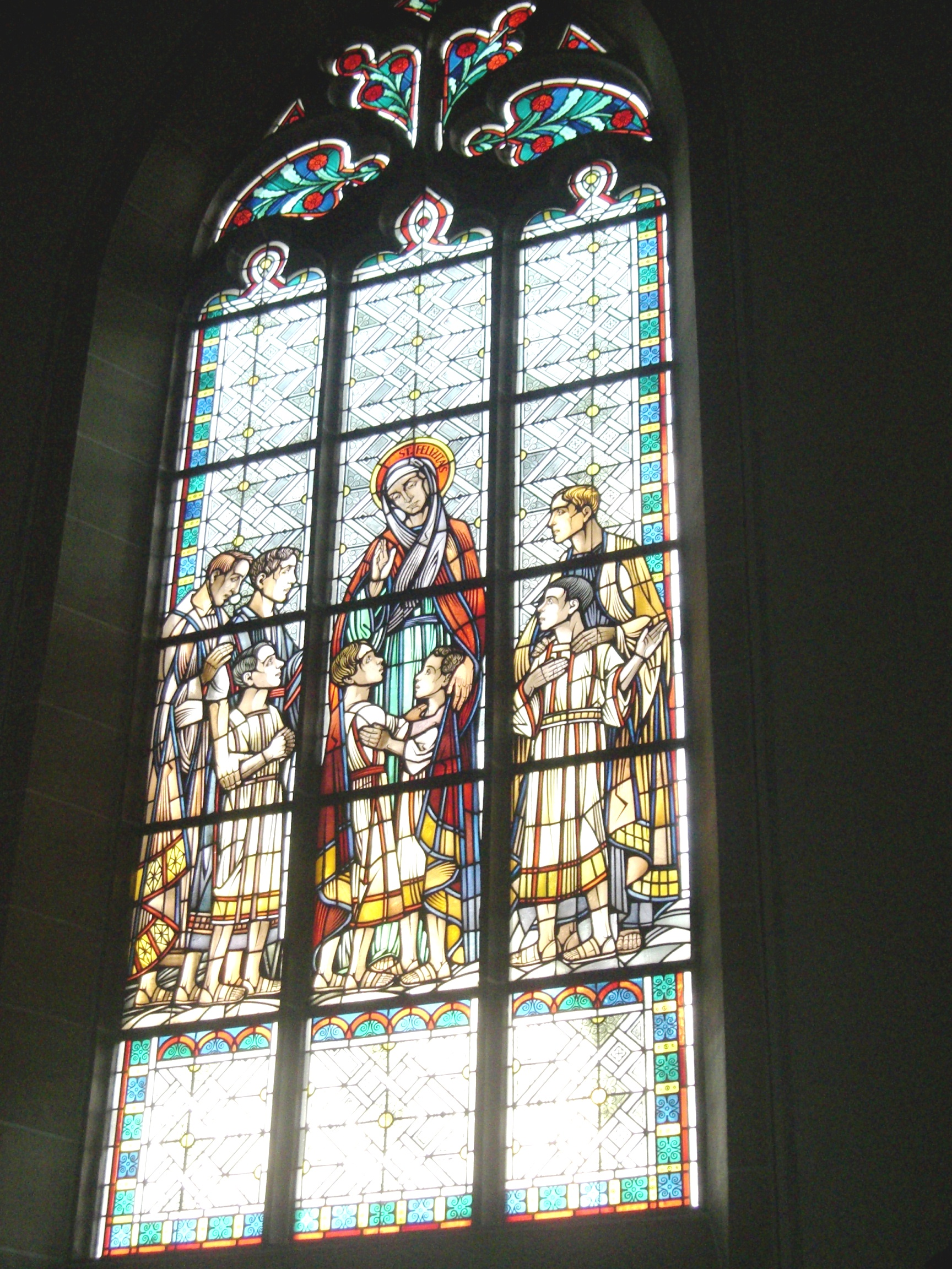 Glasfenster mit Bildnis St. Felizitas